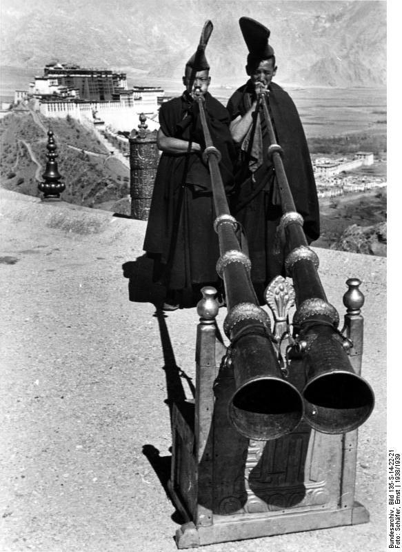 Lhasa, Medizinberg, Lamas blasen Tuben